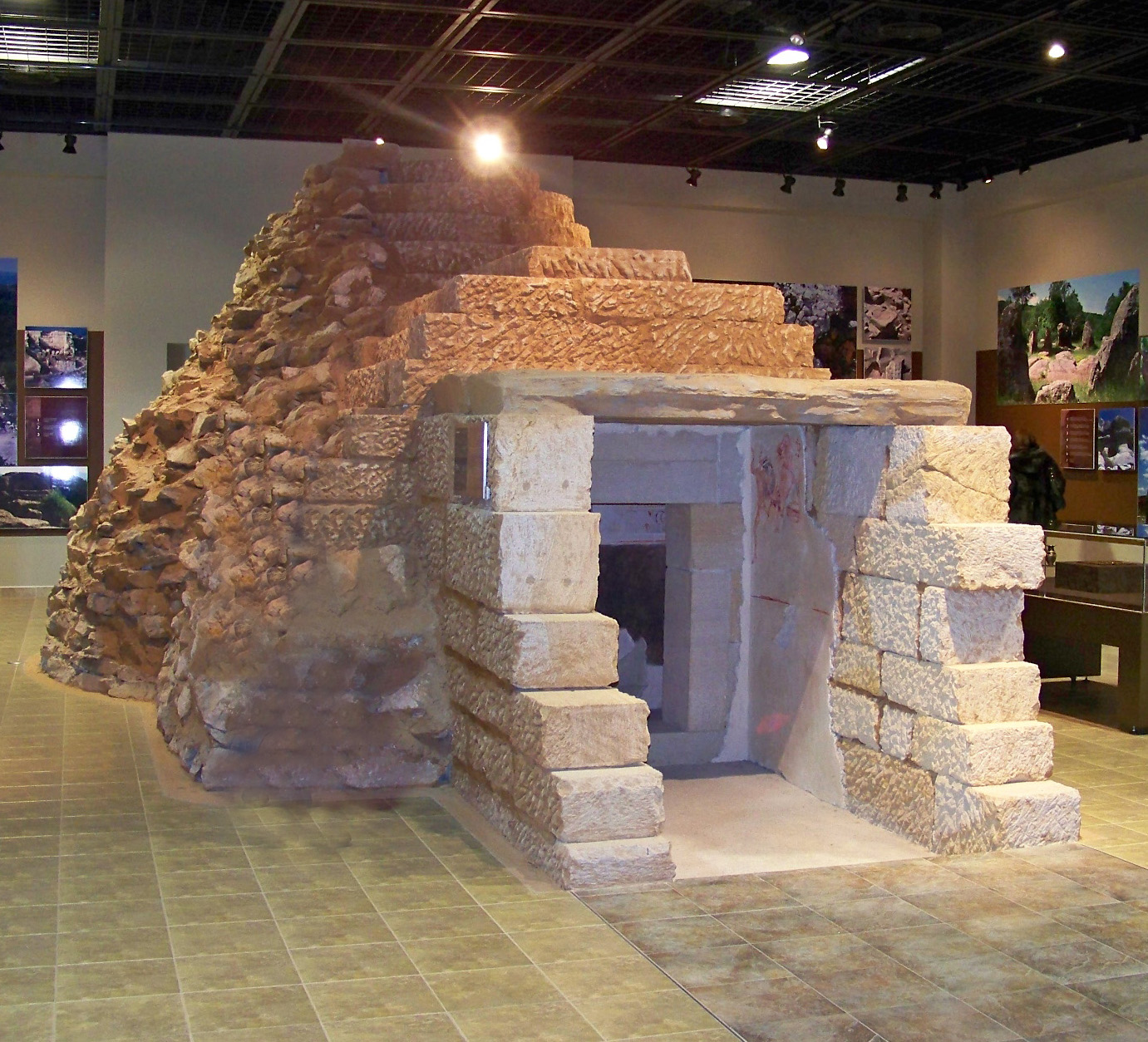 Александровска гробница, Хасково